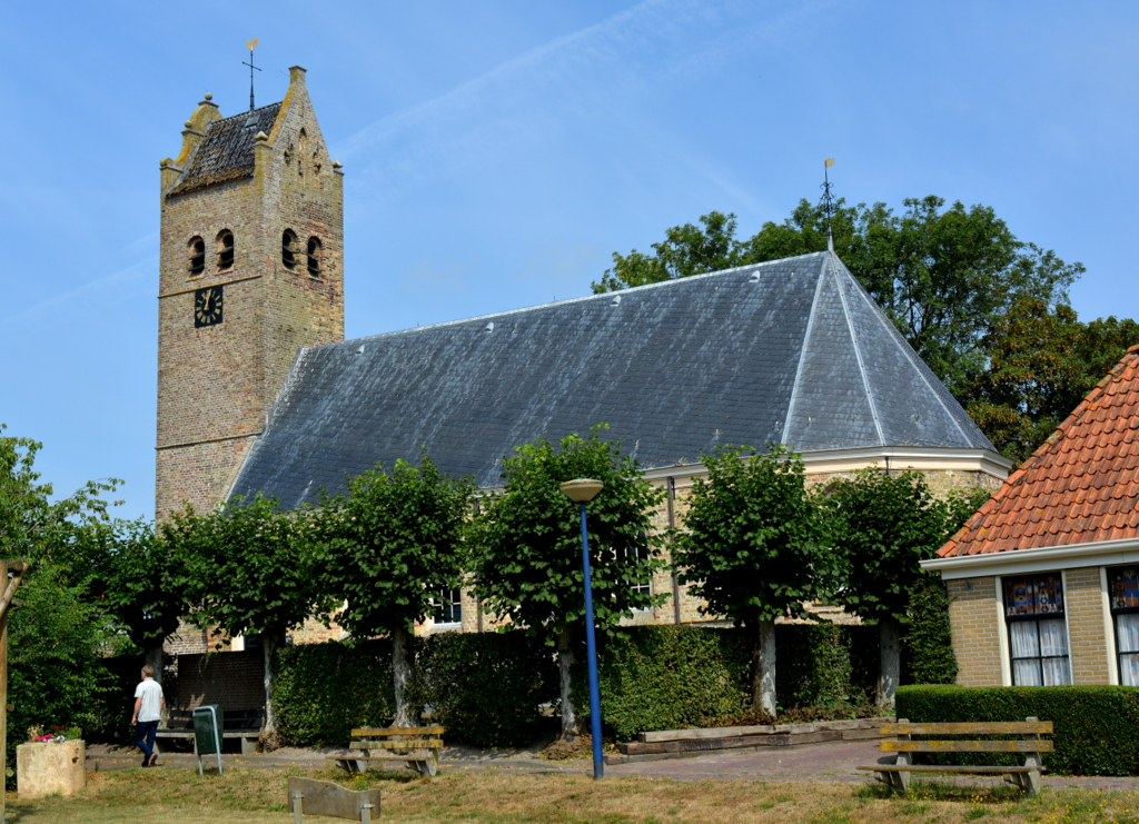 Hilaard, Jehannes de Dopertsjerke